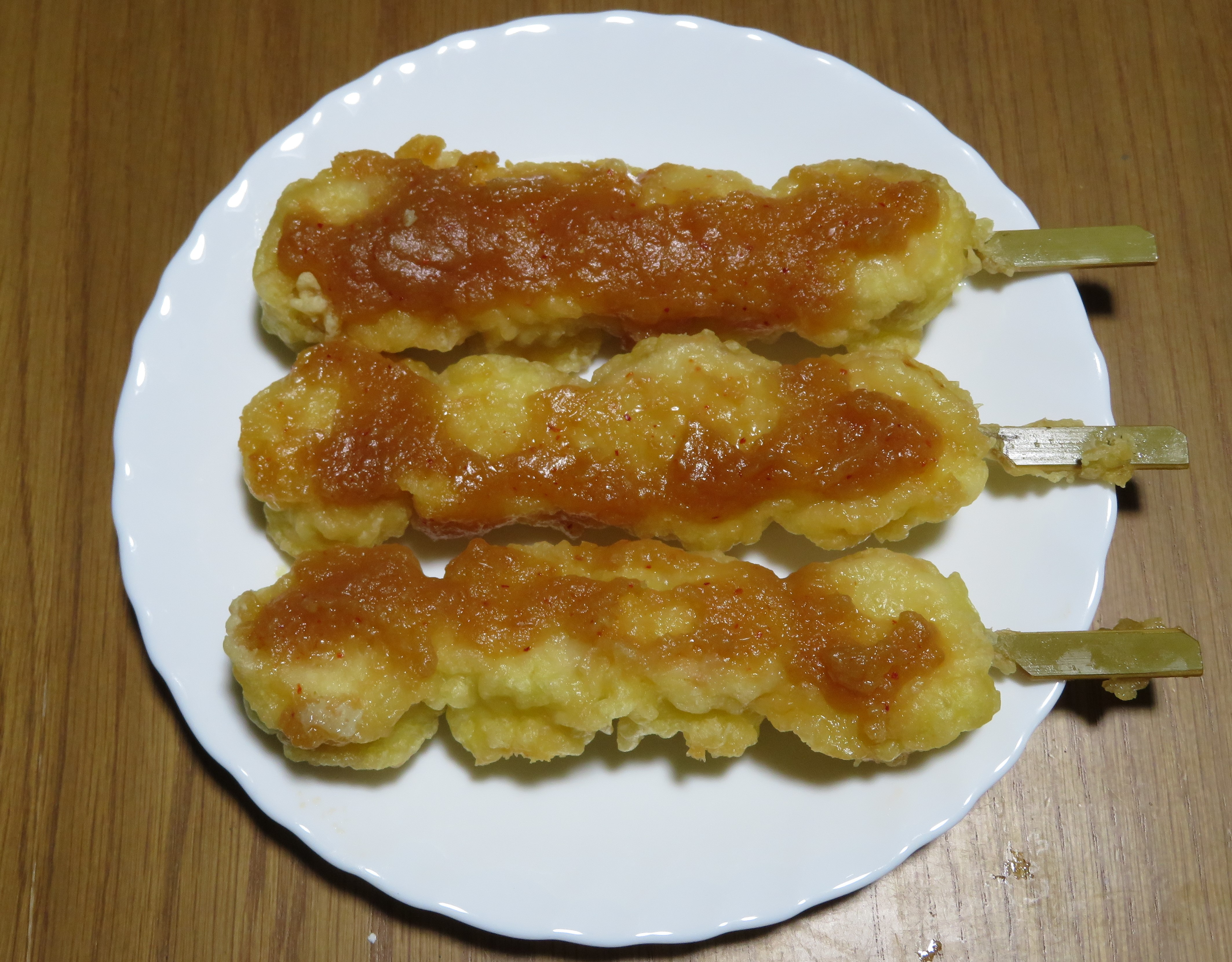 埼玉県秩父地方の郷土料理みそポテト（串揚げしたもの） Canon PowerShot SX720 HS